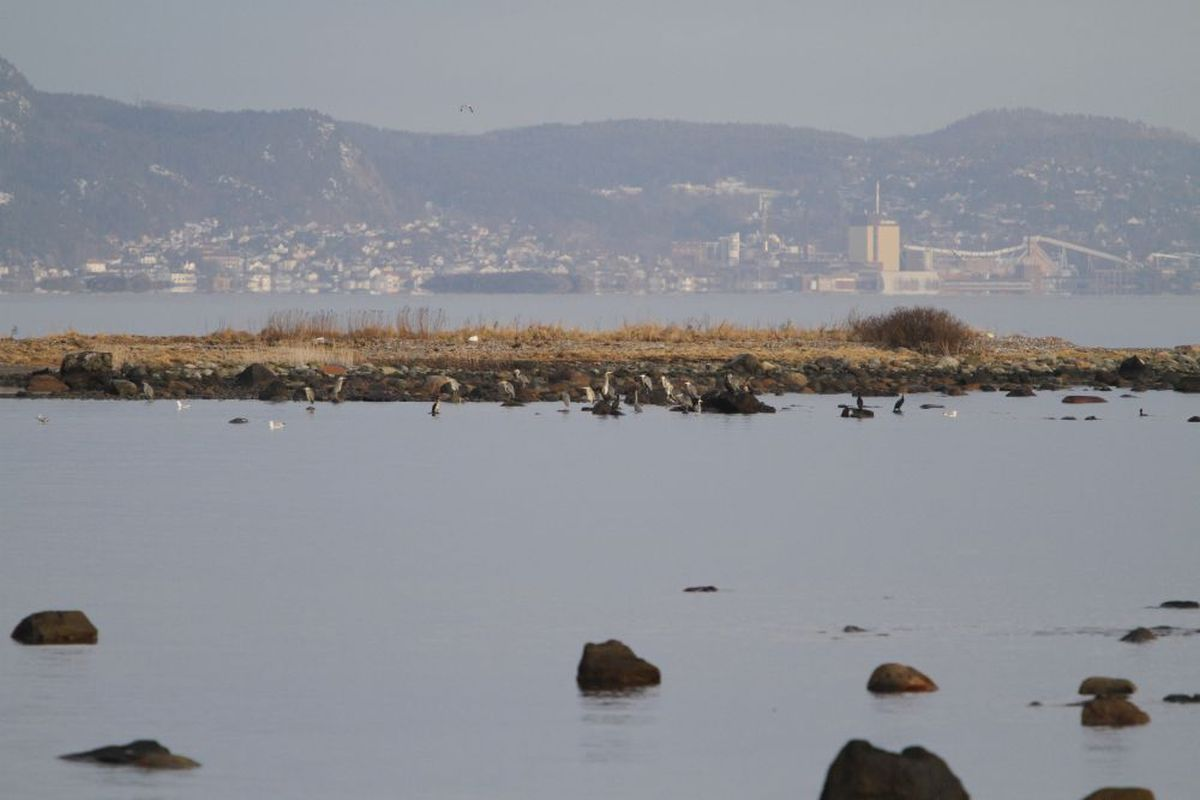 Vinter på Vealøs. Både gråhegre og storskarv har slått seg ned. Tofte på Hurum i bakgrunnen.